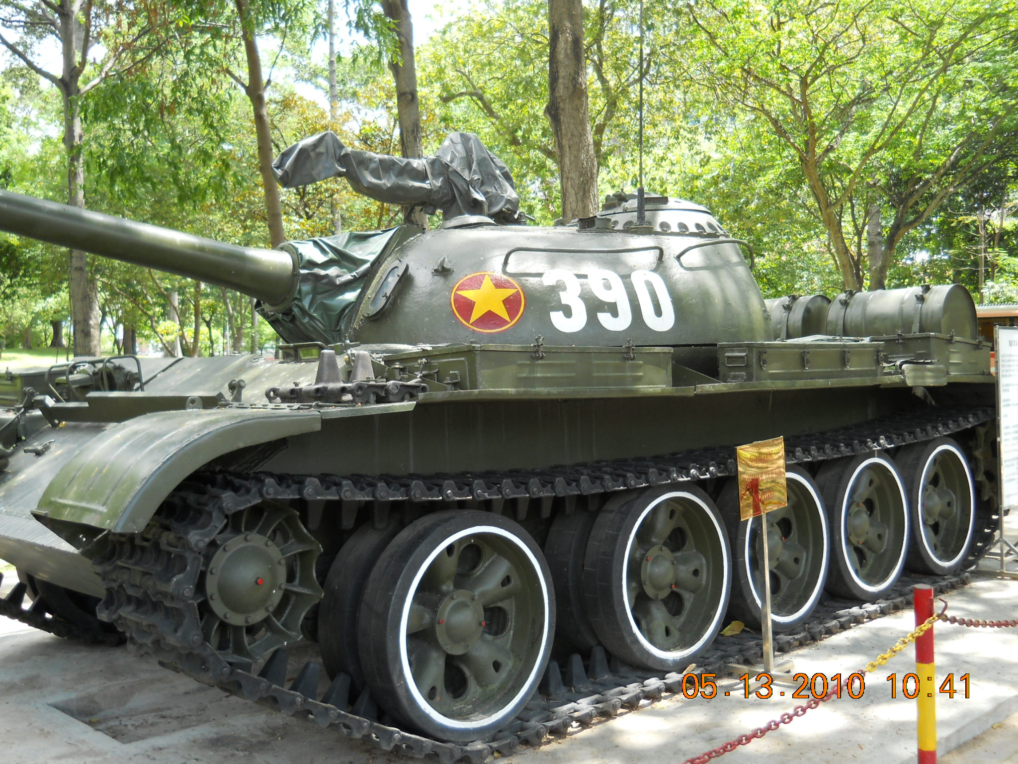 Một trong hai chiếc xe tăng tiến vào dinh Độc lập 30/4/1975 mang số hiệu 390 Ghi chú: Hình này chụp một phiên bản đồng dạng đồng thời với Xe tăng 390 nay được trưng bày tại Hội trường Thống nhất (Dinh Độc Lập cũ). Xe tăng 390 "gốc" hiện được lưu giữ tại Bảo tàng Lực lượng Tăng Thiết Giáp[1]